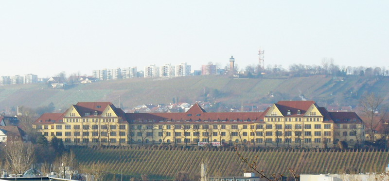 Stuttgart Bad Cannstatt Reiterkastell mit Burgholzhof self made photo by user:Enslin at 8 JAN 2006 in Stuttgart-Bad Cannstatt Kurpark